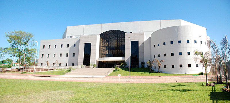 Vista frontal de la Iglesia Centro Familiar de Adoración, sede central. Asunción, Paraguay.